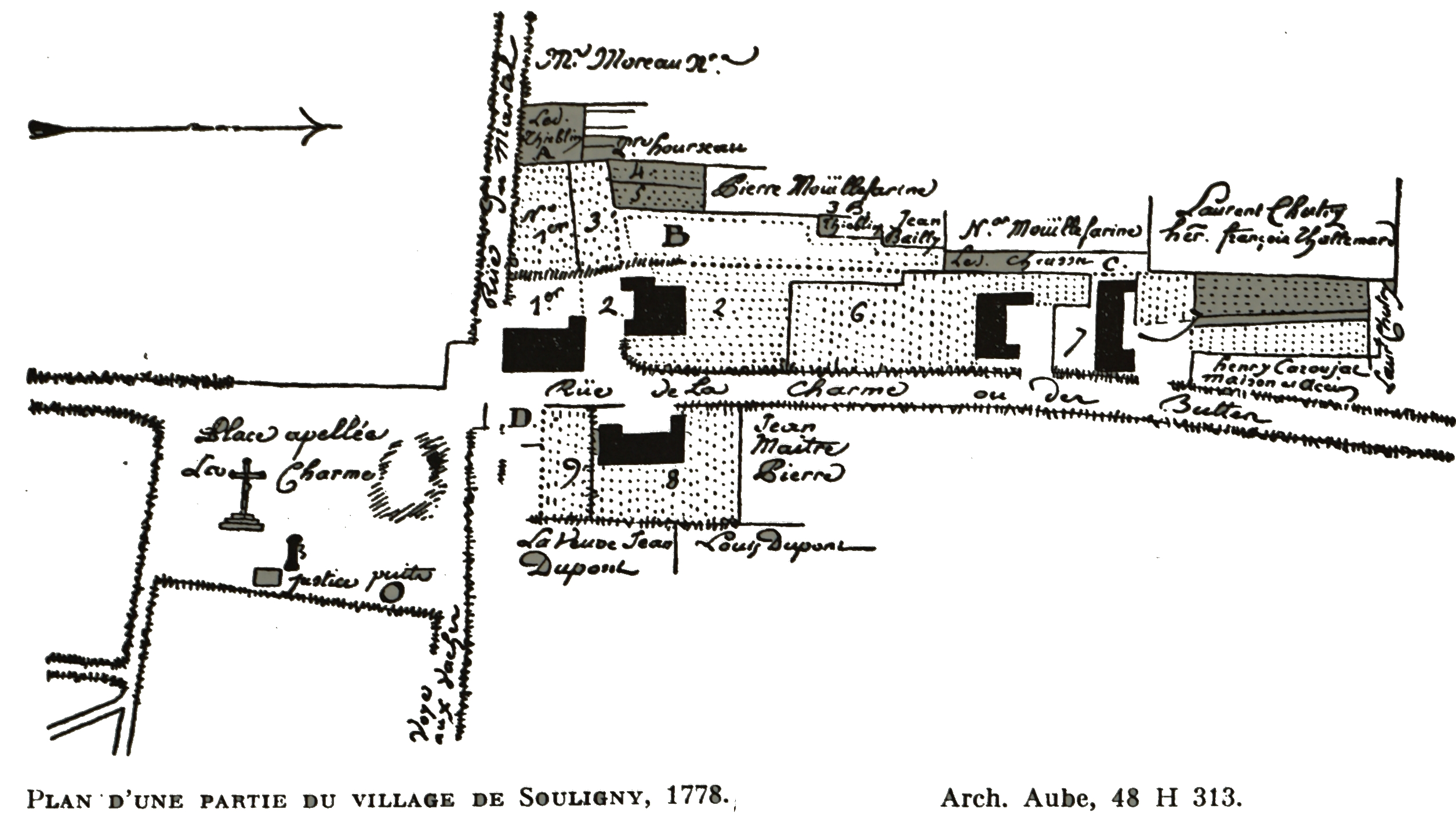 image de souligny.